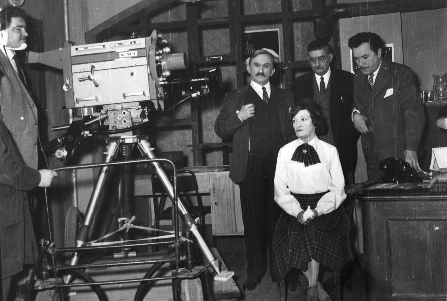 MTV stúdió, Rajz János, Makláry János, Benkő Gyula és Kiss Manyi színművészek. Location: Hungary, Budapest V. Tags: Hungarian TV, Budapest Title: MTV stúdió, Rajz János, Makláry János, Benkő Gyula és Kiss Manyi színművészek.